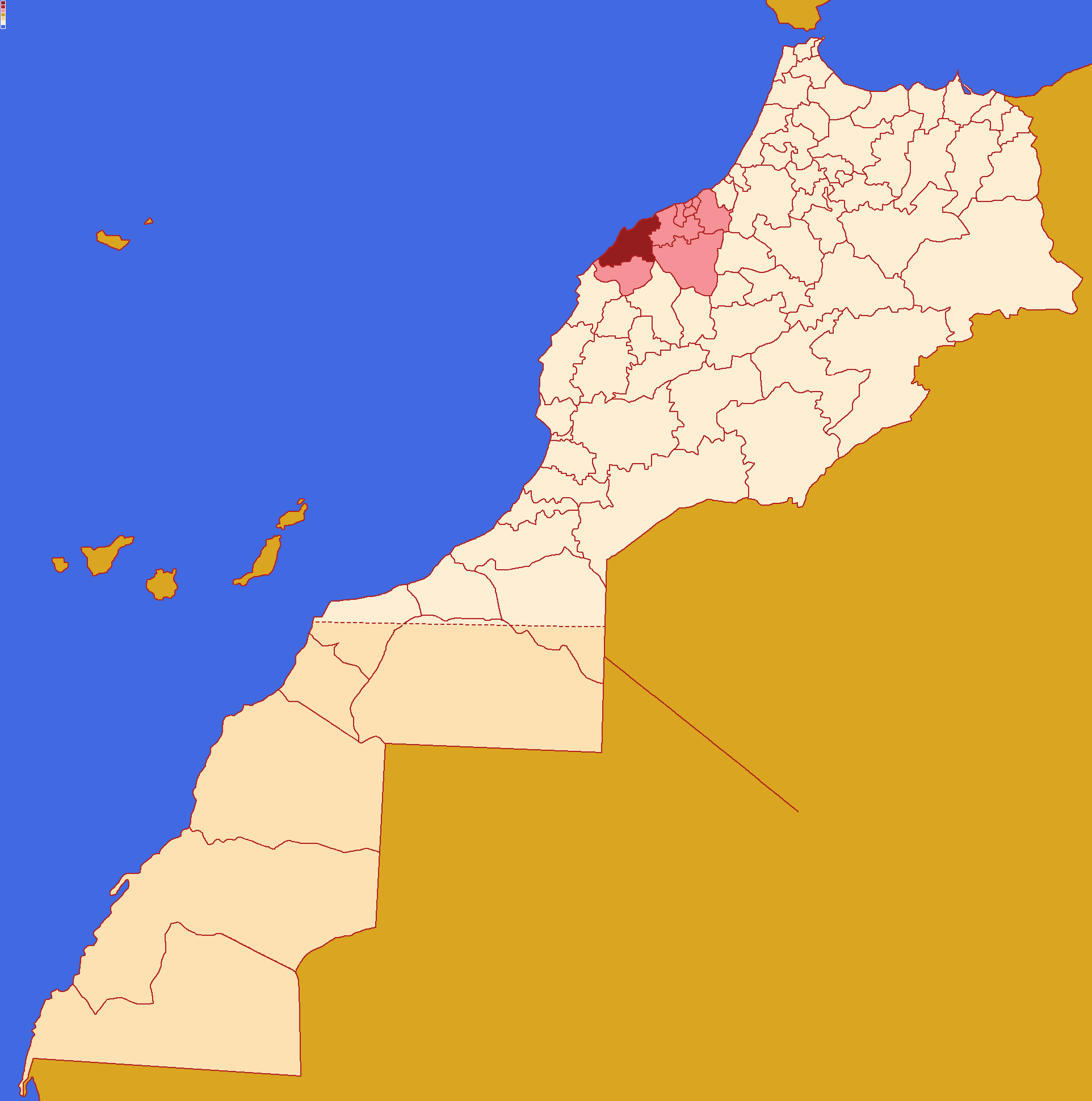 Localização da província de El Jadida , dentro da região de Casablanca-Settat e dentro de Marrocos. Conforme a reforma administrativa de 2015.